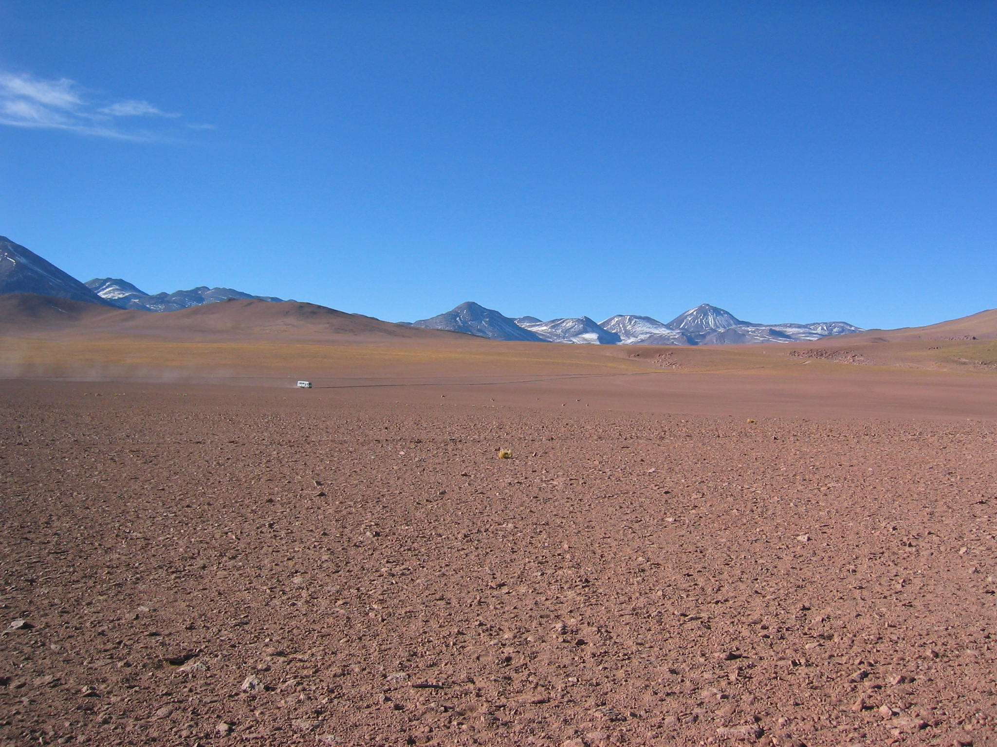 Sairecabur volcanic complex.